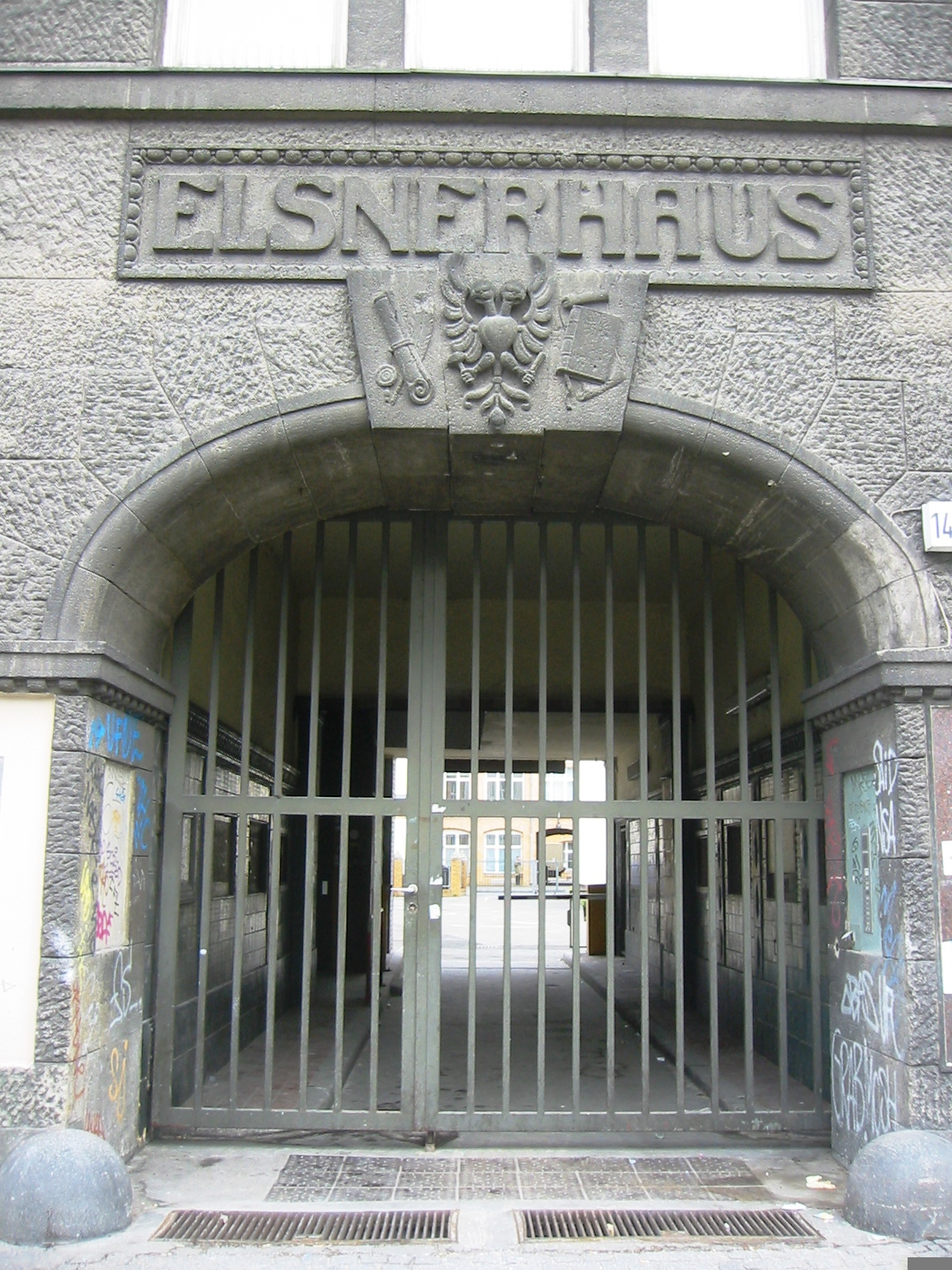 Eingangsportal zum denkmalgeschützten "Elsnerhaus" in der Oranienstraße in Berlin-Kreuzberg